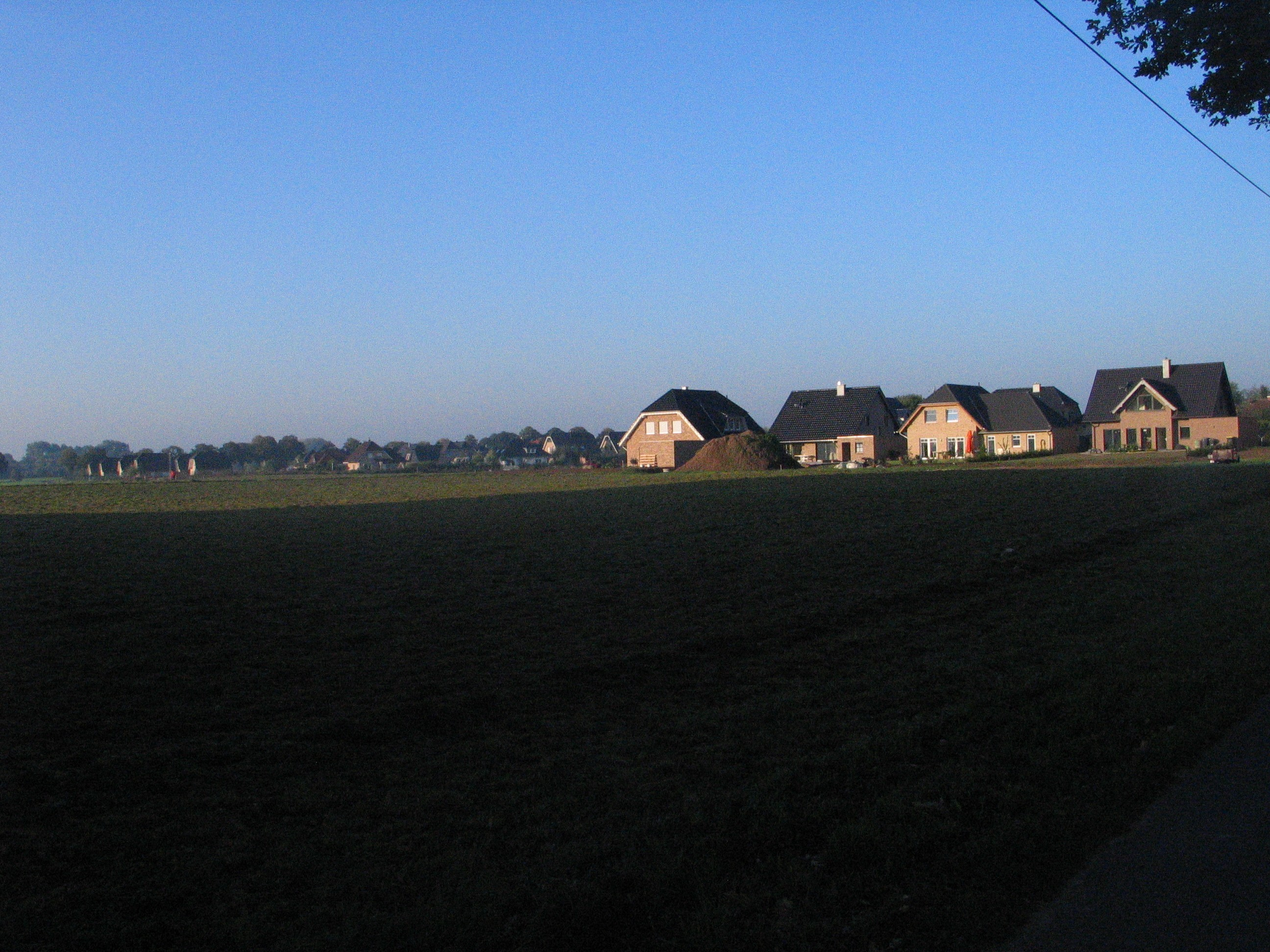 Baugebiet Kessel Nierderrhein